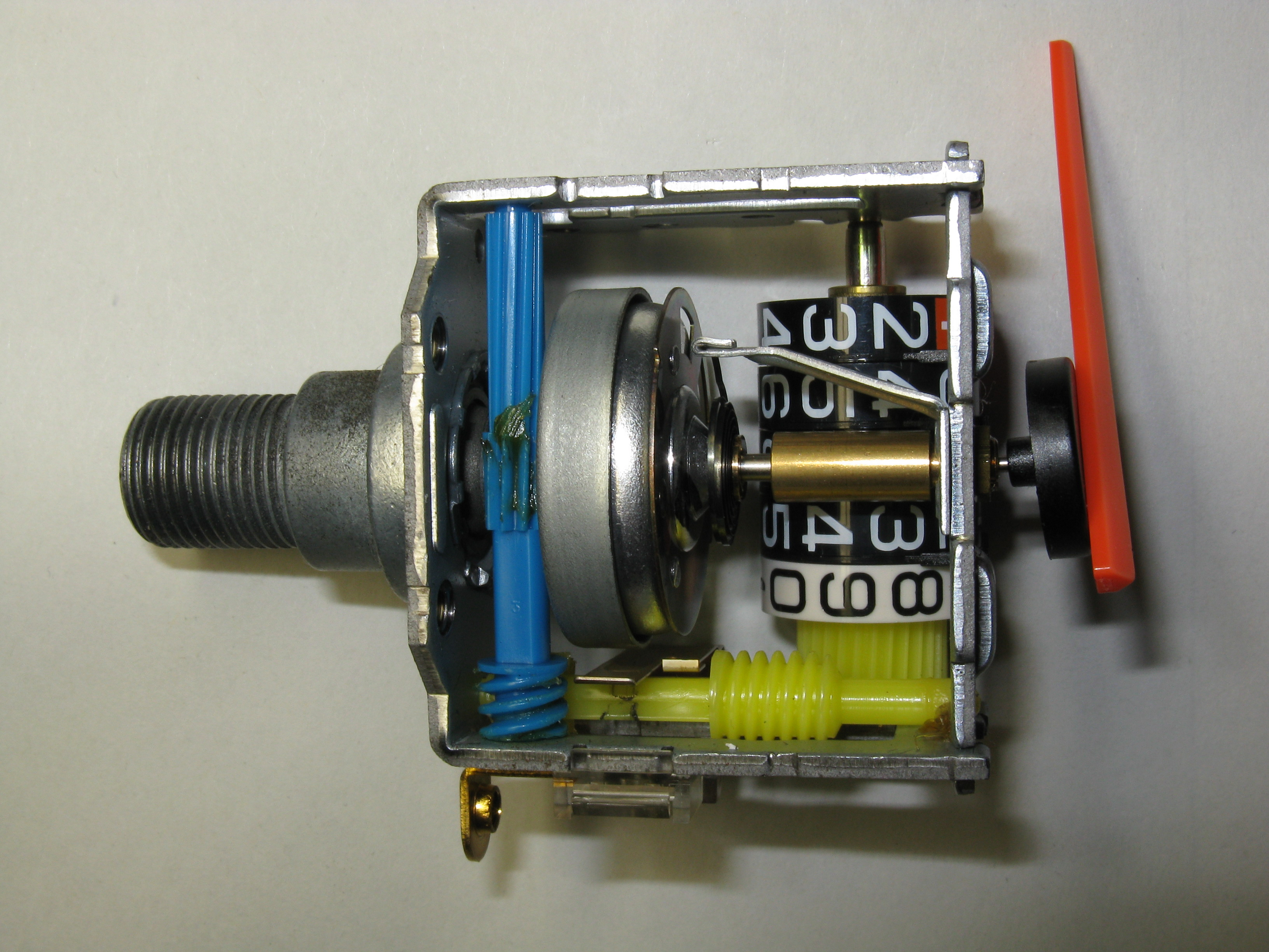 Speedometer_(Honda_Dio)